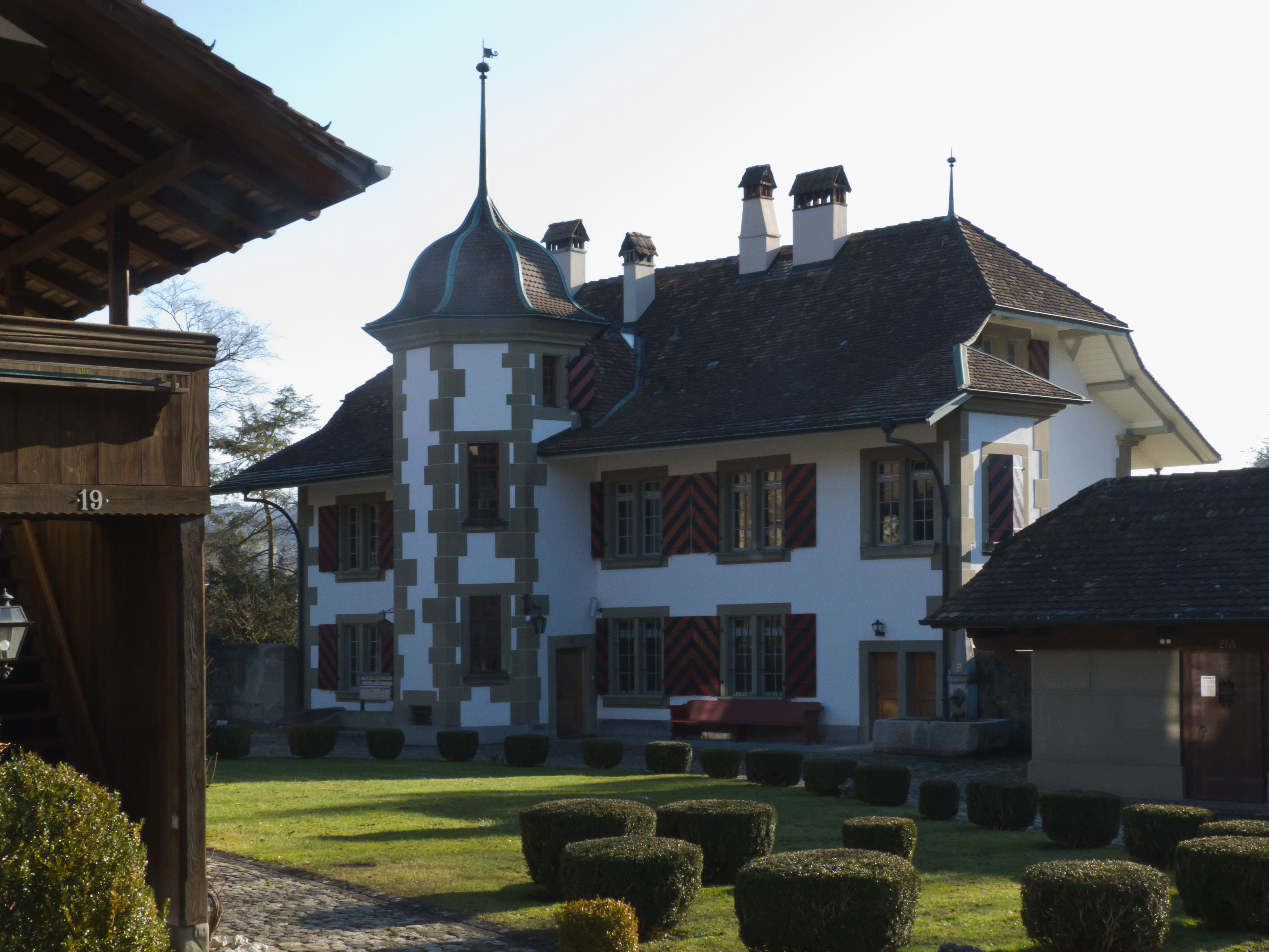 Die Campagne Thalgut, Der Wohnstock mit dem markanten Treppenhausturm